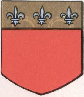 Blason de Fontanges